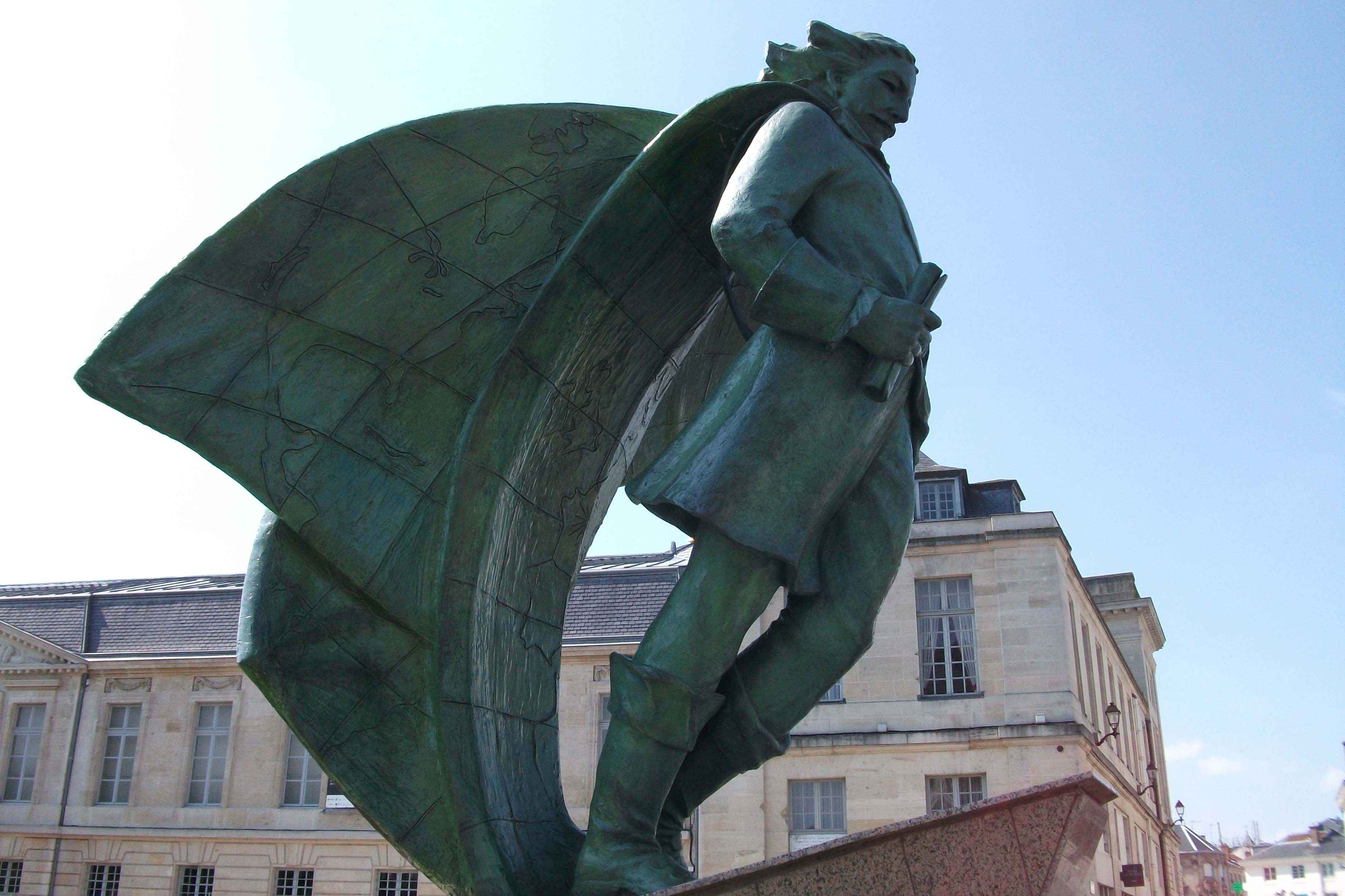 Place de Châlons en Champagne contenant une sculpture de Jean Talon .